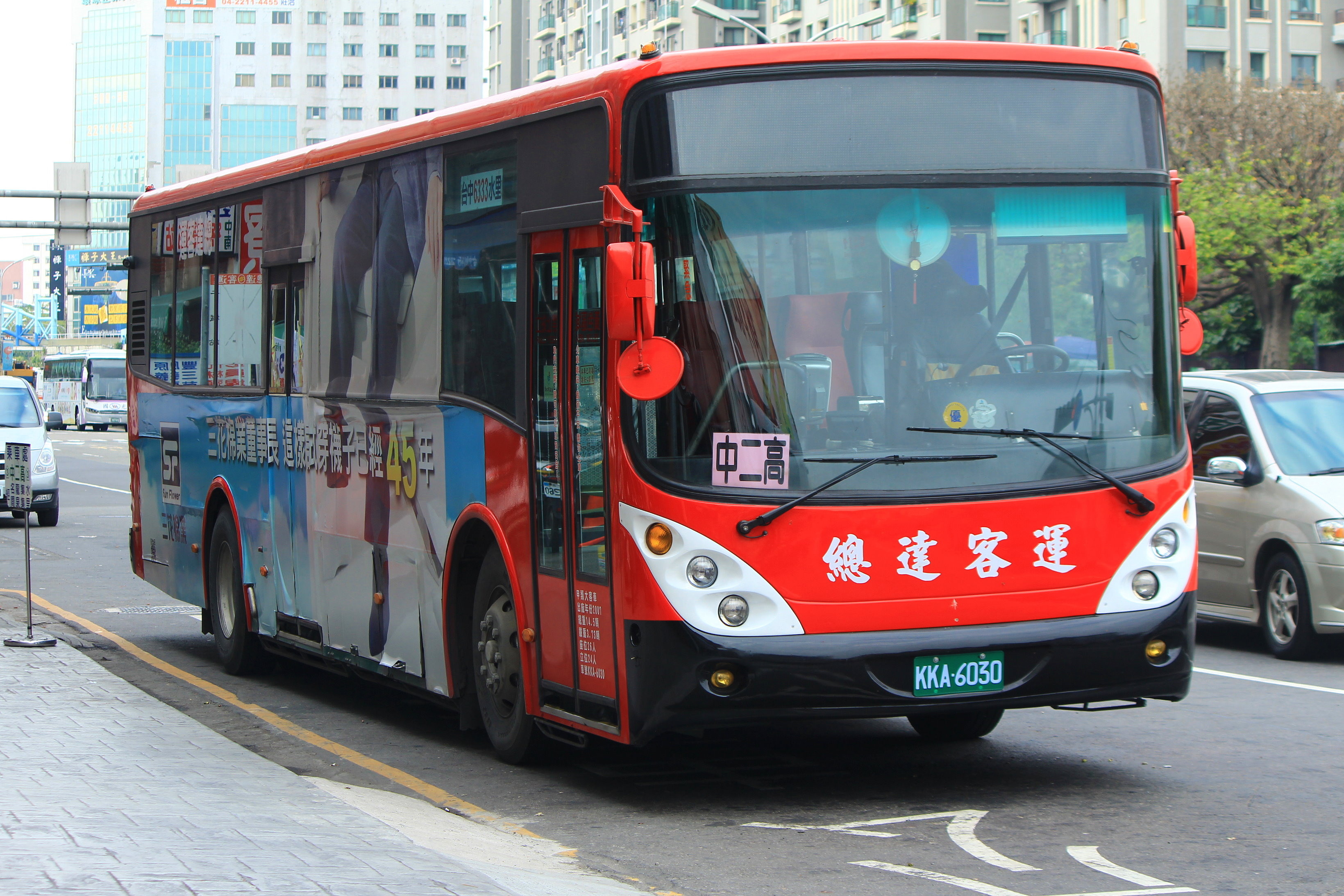 干城待發中~